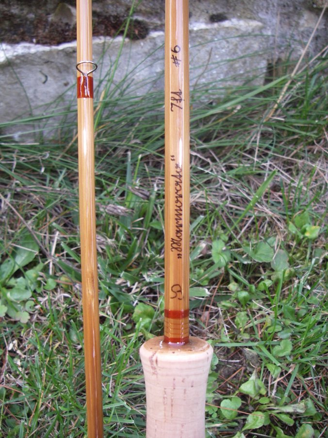 Gespliesste Fliegenrute/ Split Cane Flyrod